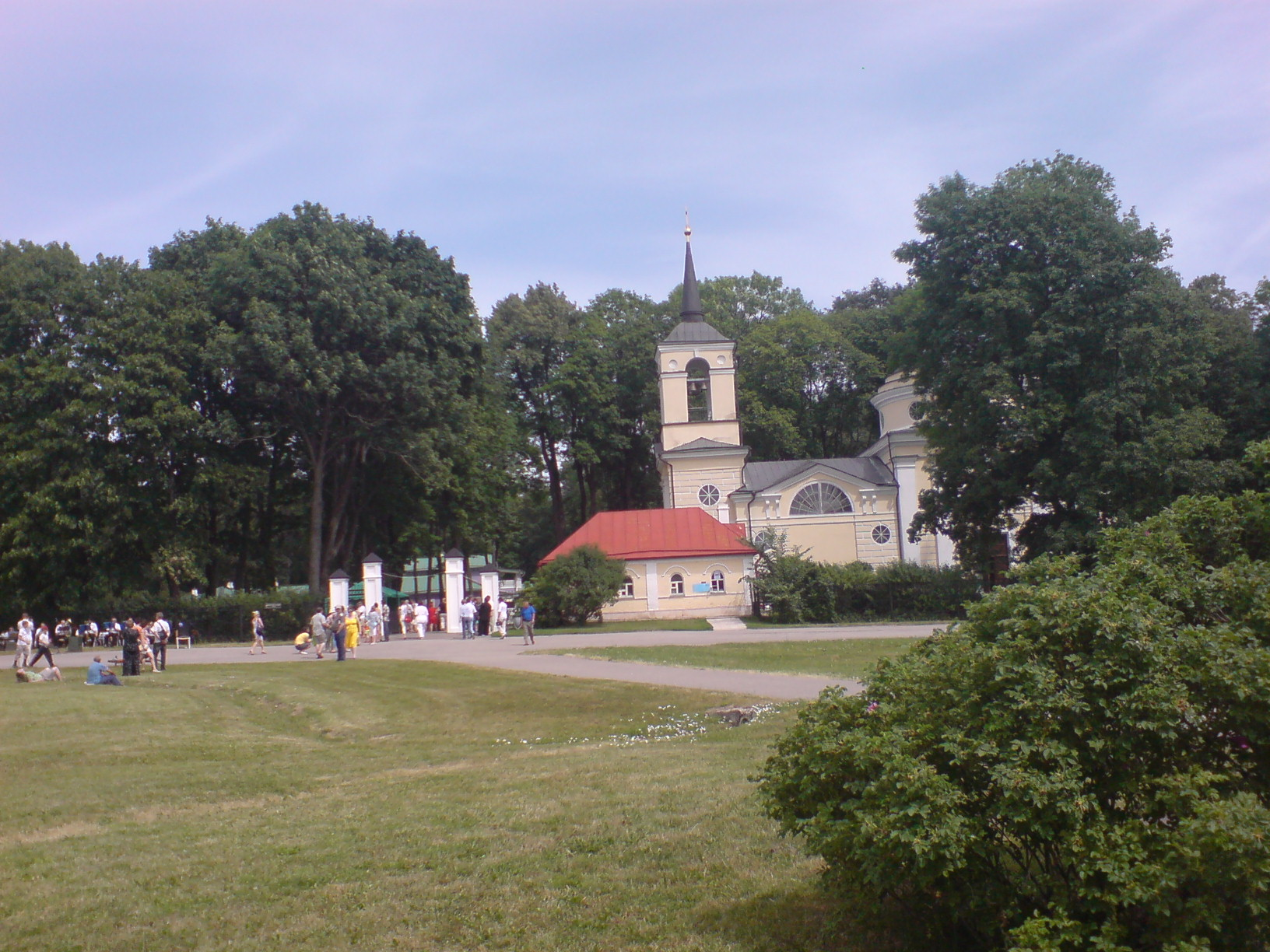 Орловская область, Мценский район, село Спасское-Лутовиново, Государственный мемориальный и природный музей-заповедник И.С.Тургенева Спасское-Лутовиново